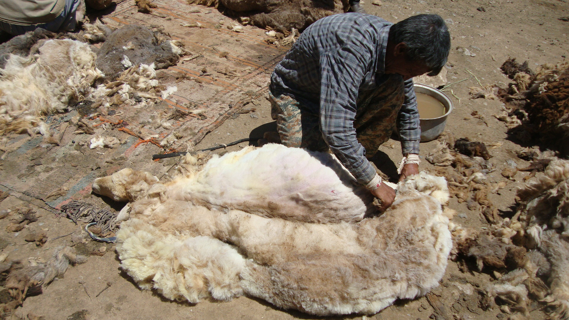 روستای زالی یکی از روستاهای شهرستان اسفراین محسوب میگردد که در این روستا تیره از ترکان بغایری زندگی مکنند شغل اصلی مردم این روستا دامپروری است . این عکس یکی از مراحل زدودن پشم از گوسفند در فصل بهار را نشان می دهد